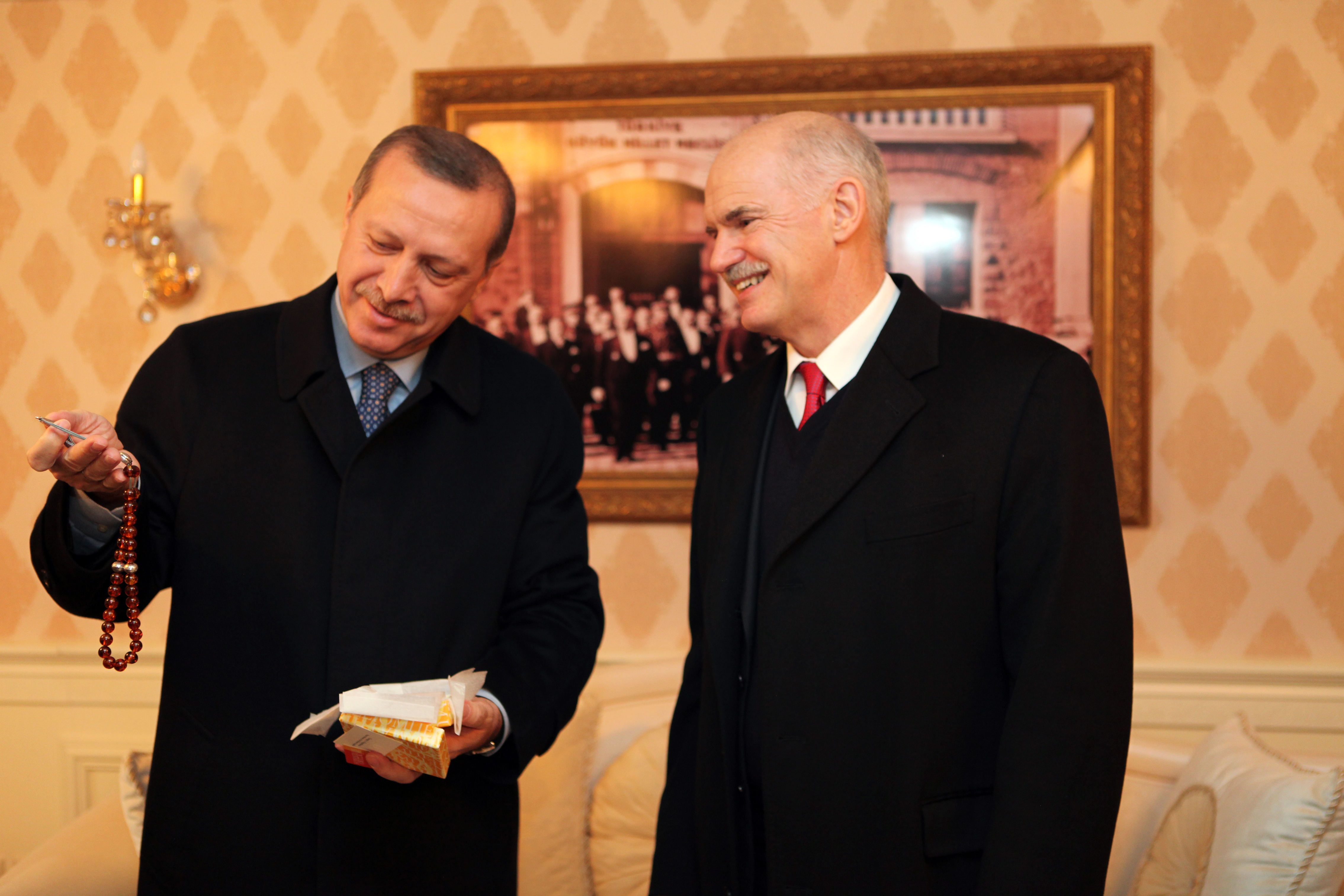 Turkish Prime Minister Recep Tayyip Erdoğan and Greek Prime Minister George Papandreou in Erzurum, Turkey.